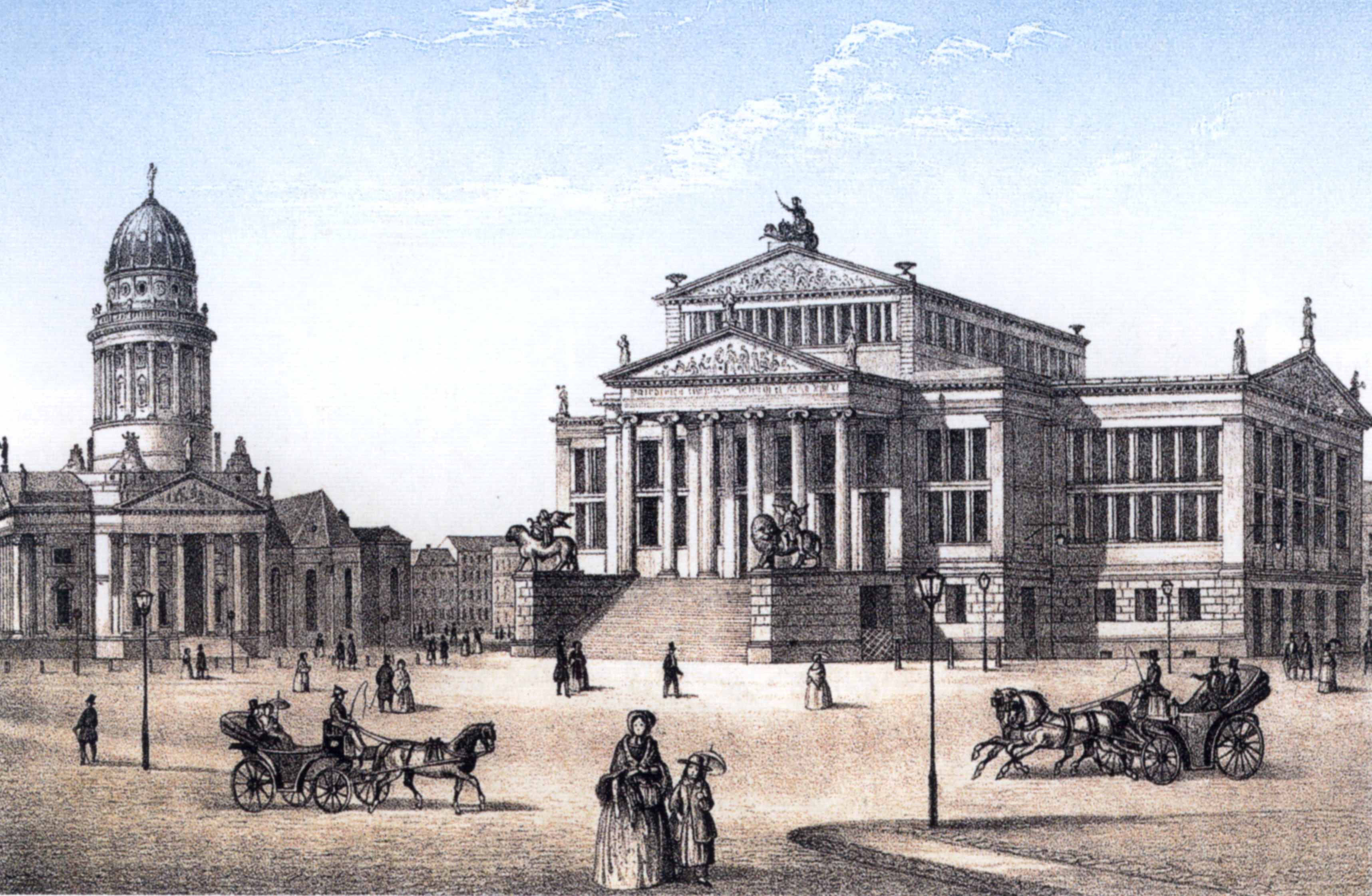 Berlin, Gendarmenmarkt mit Kgl. Schauspielhaus; Berlin ohne Jahr; Lithograhpie von Erich Henning Theaterwissenschaftliche Sammlung der Universität zu Köln (Schloss Wahn)